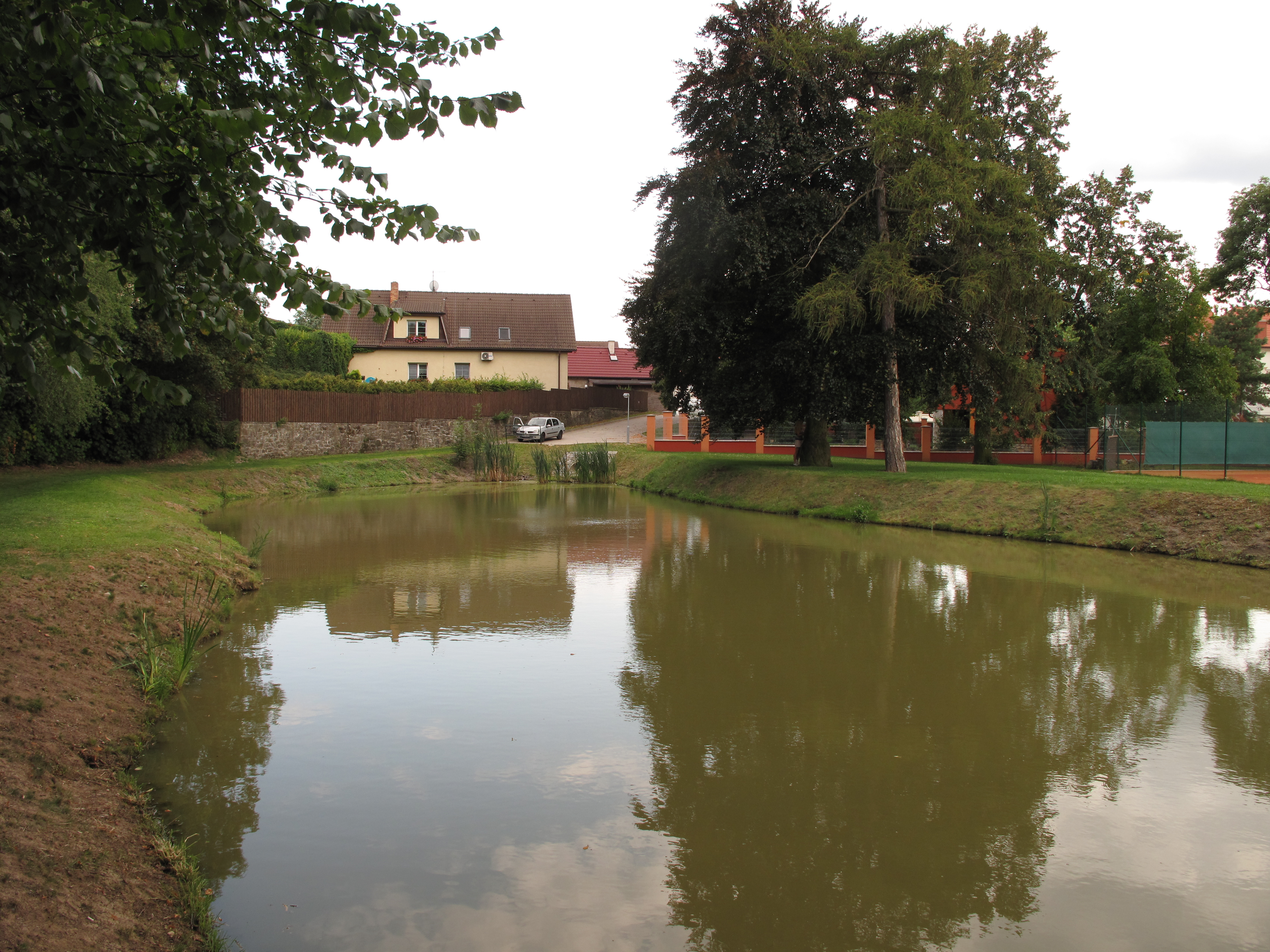 Rybník Haltýř v Radonicích. Okres Praha-východ, Česká republika.